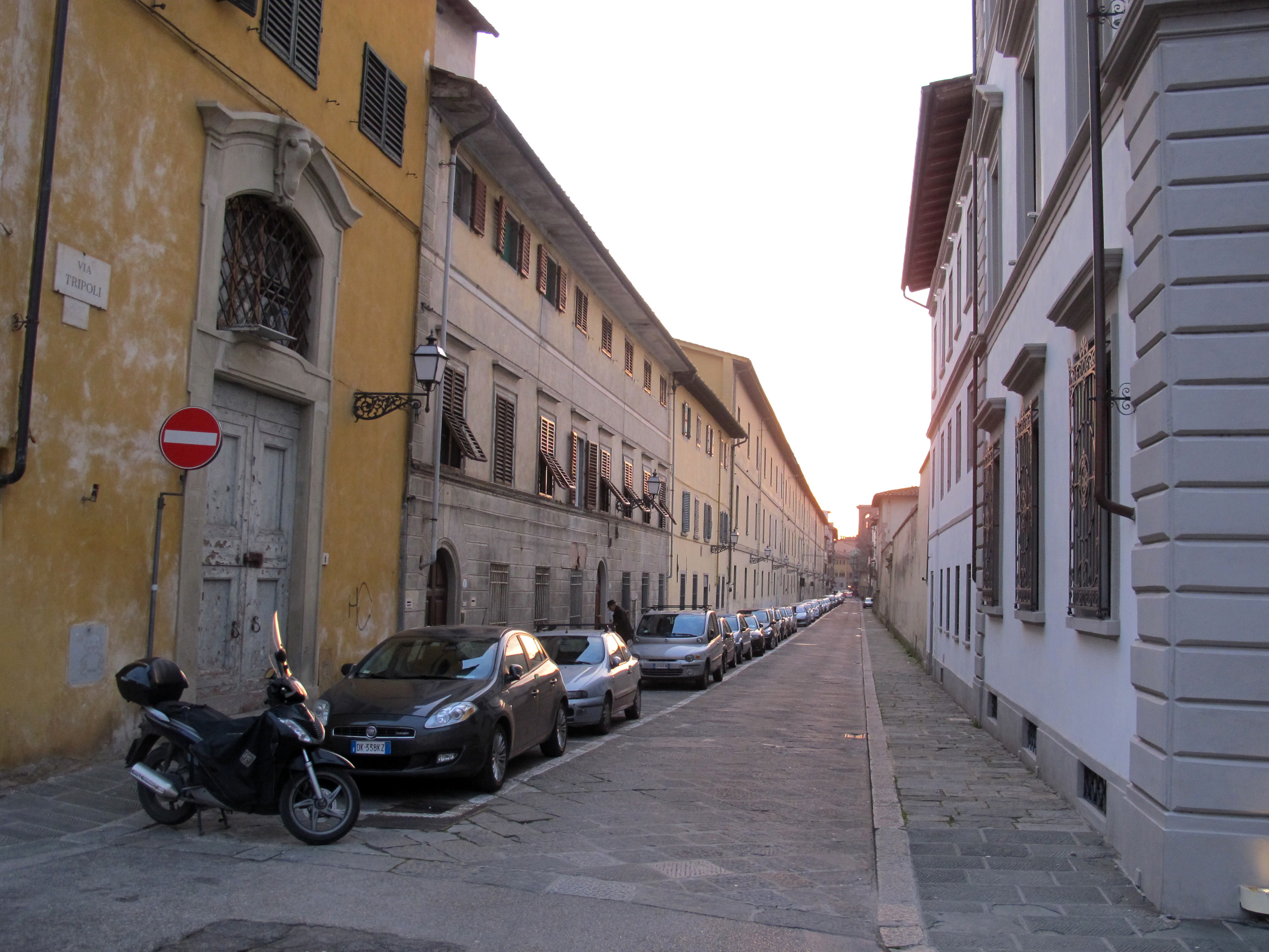 Via tripoli